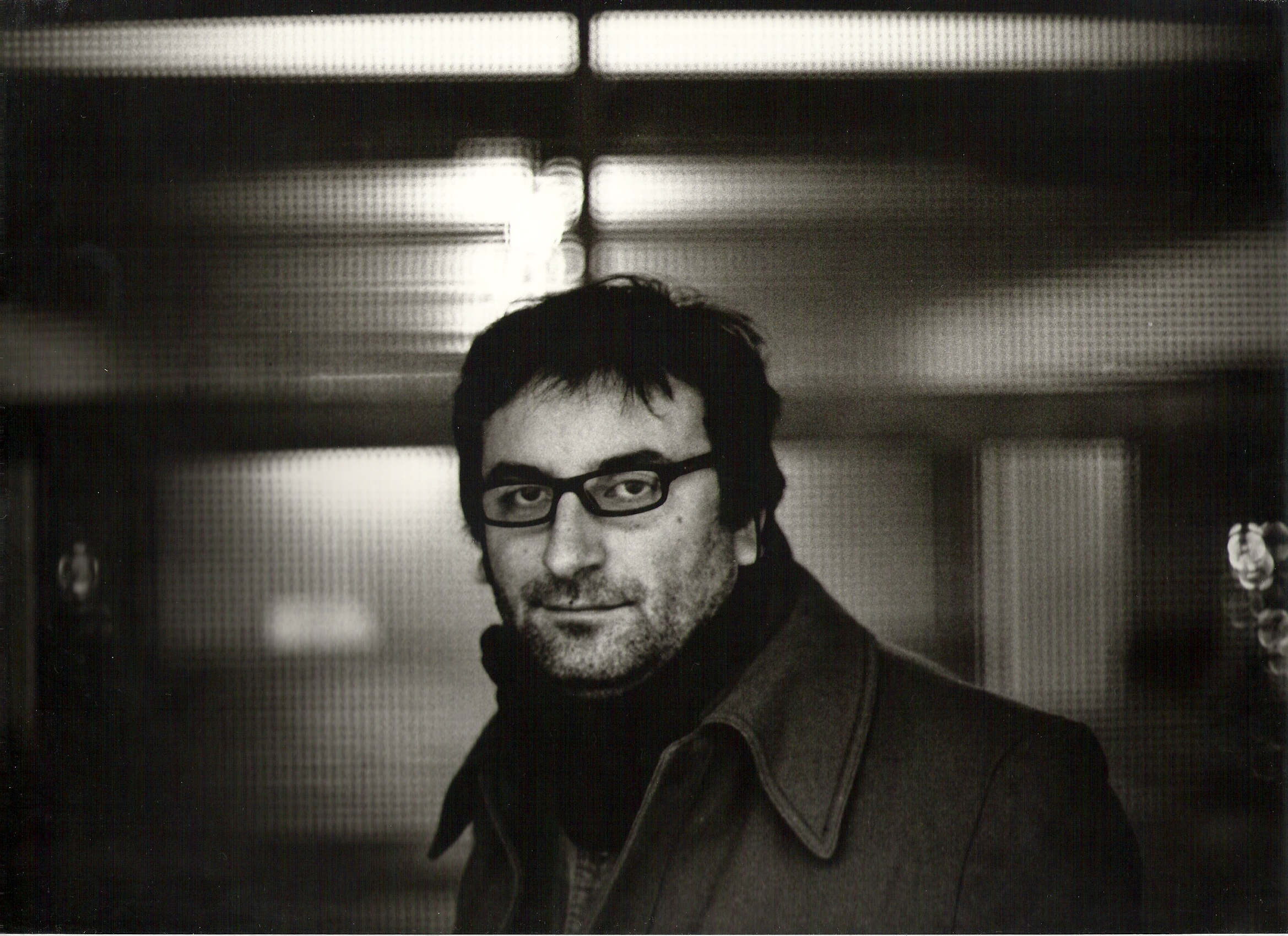 El poeta chileno Yanko González en Berlín